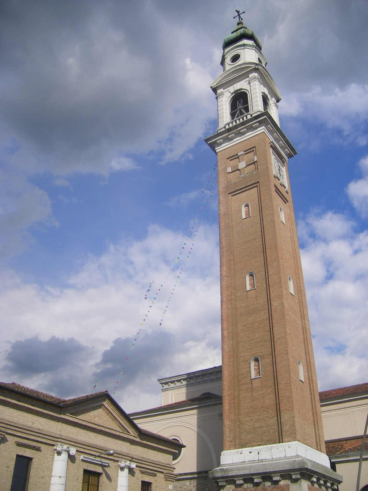 Spresiano